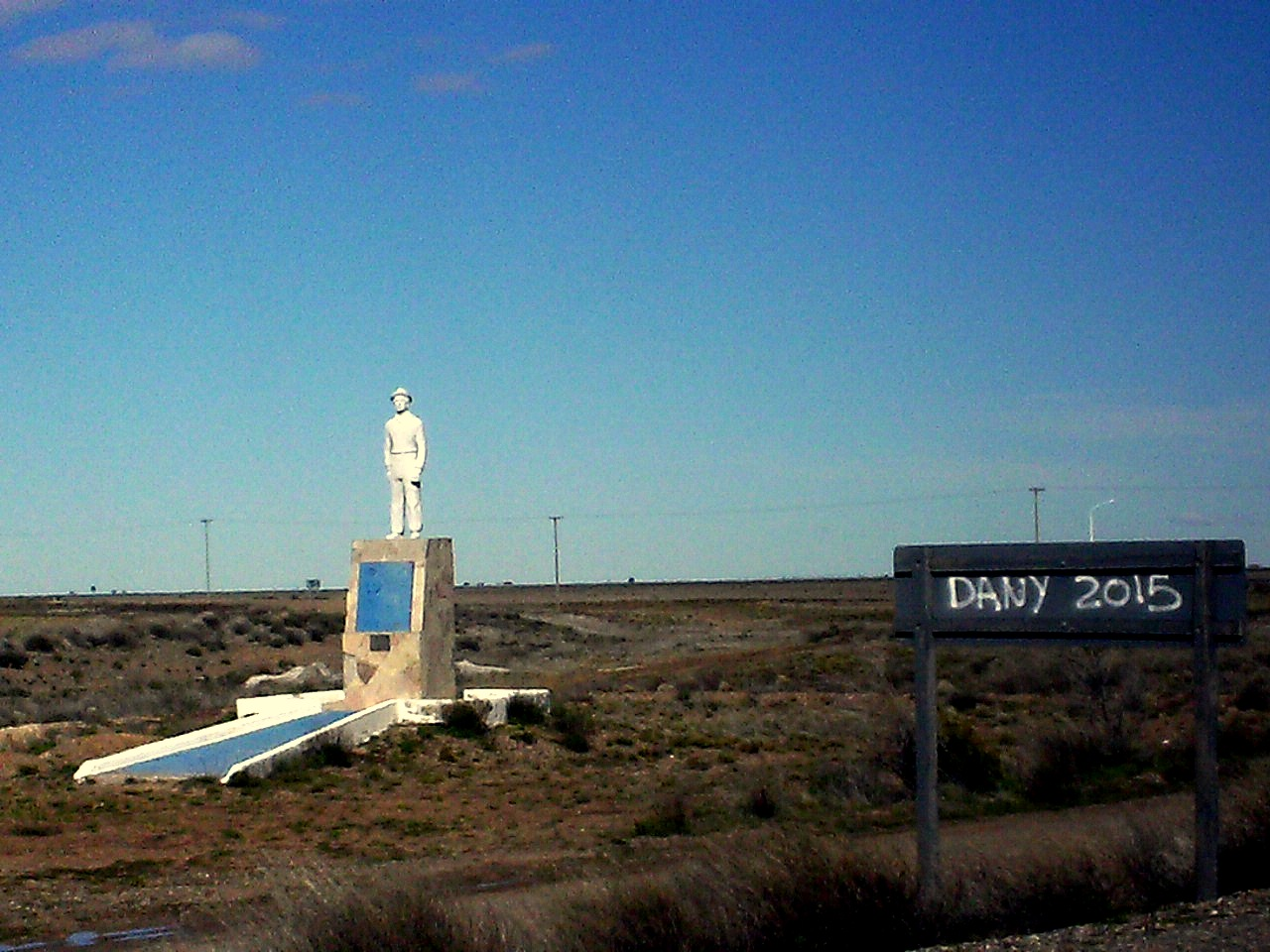 Monumento a Fcón Grande en laentrada al pueblo